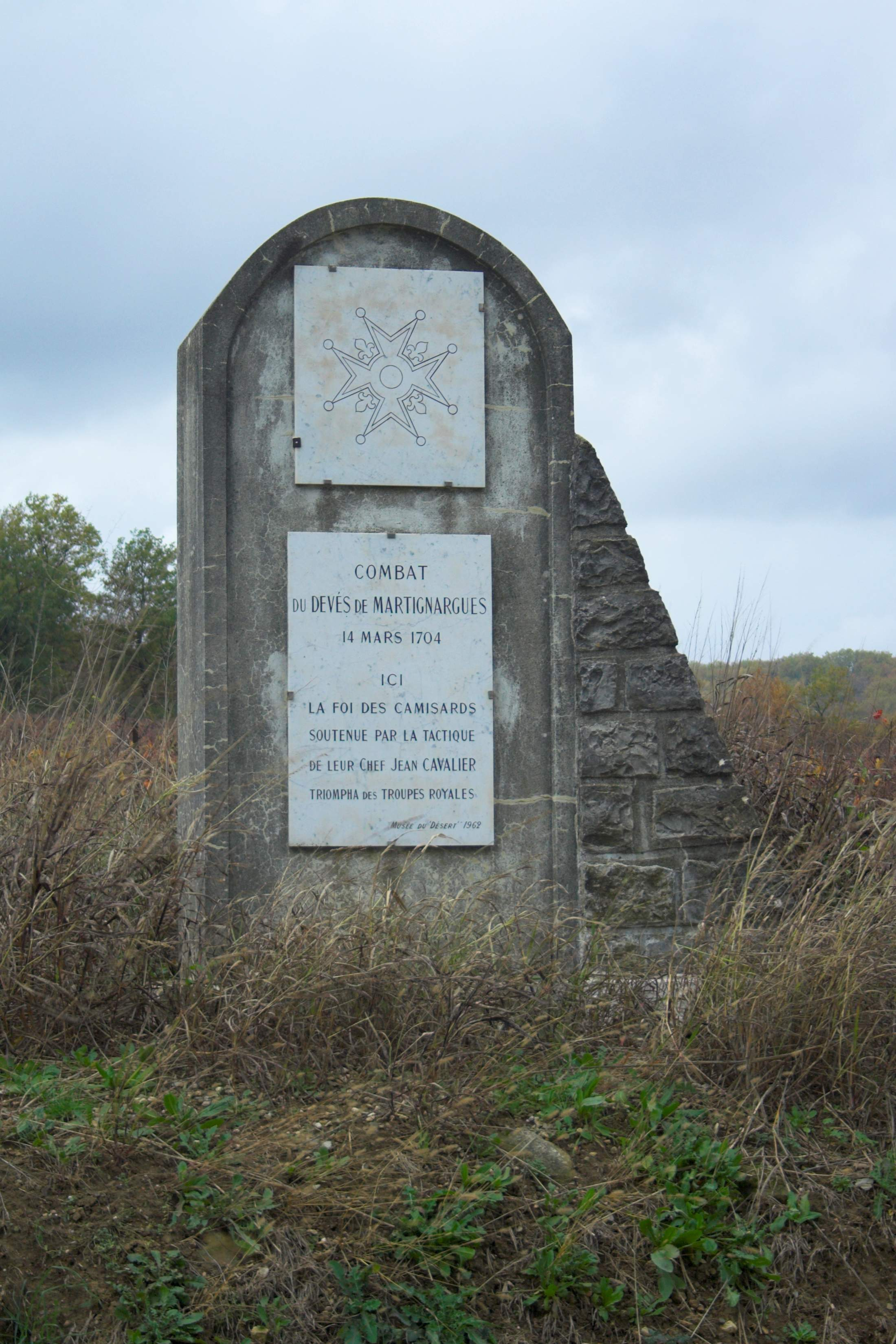 Monument commémorant la bataille des camisards au Déves à Martignargues (Gard - FRANCE)